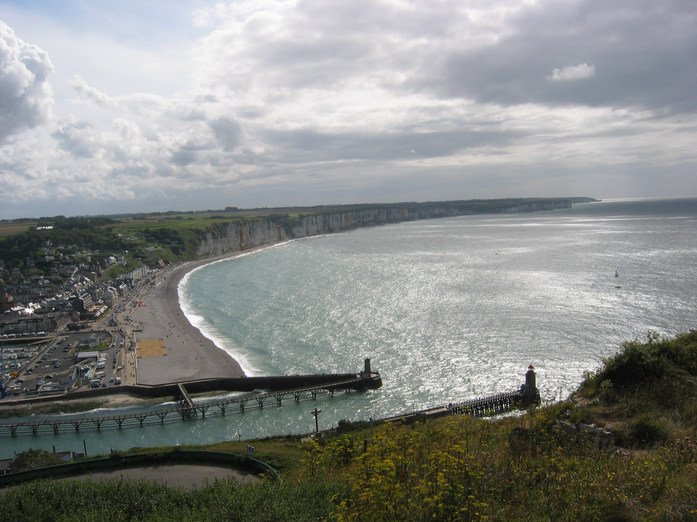 Fécamp, la mer vue de la falaise, Normandie, France